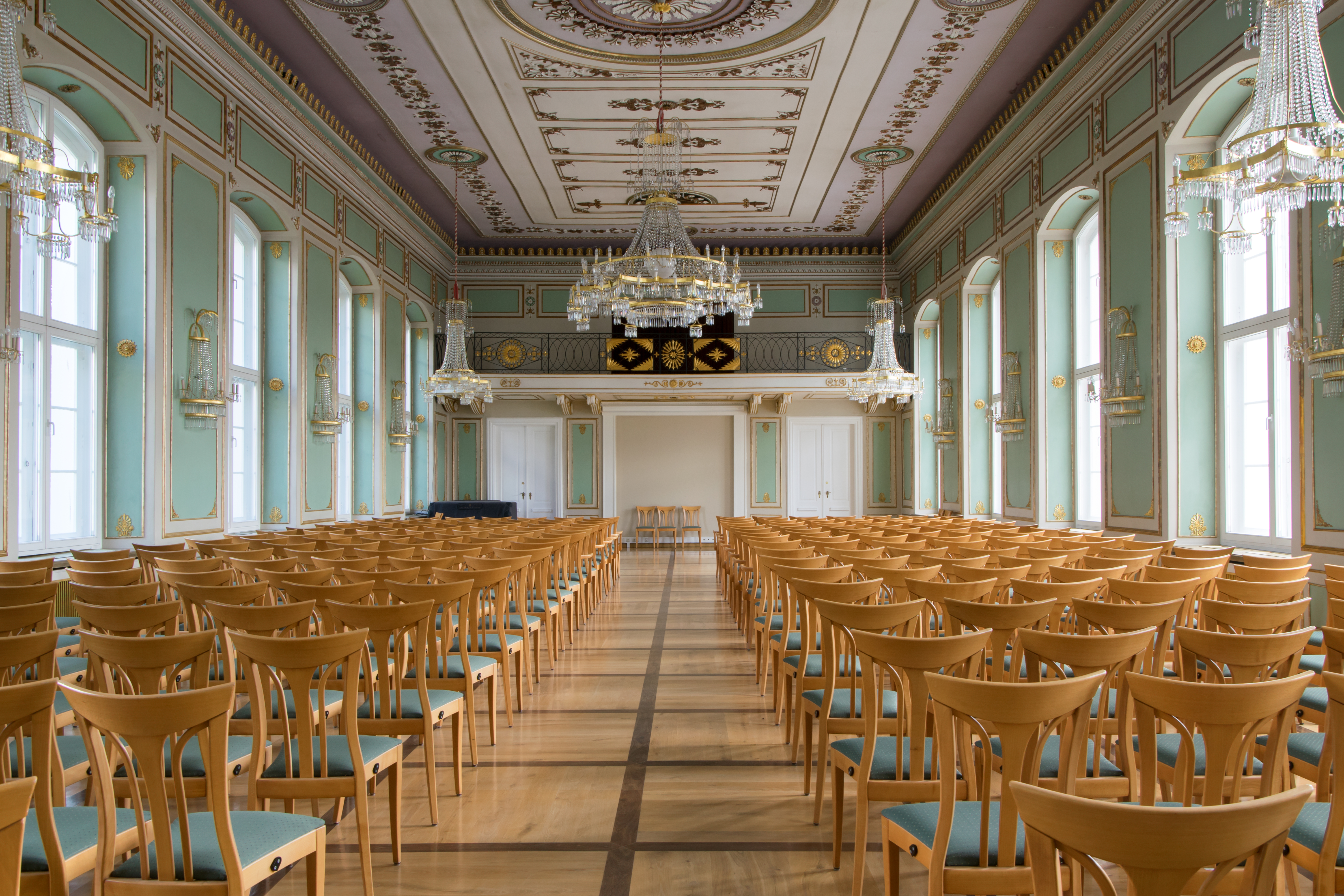 Doberan Salongebäude Saal